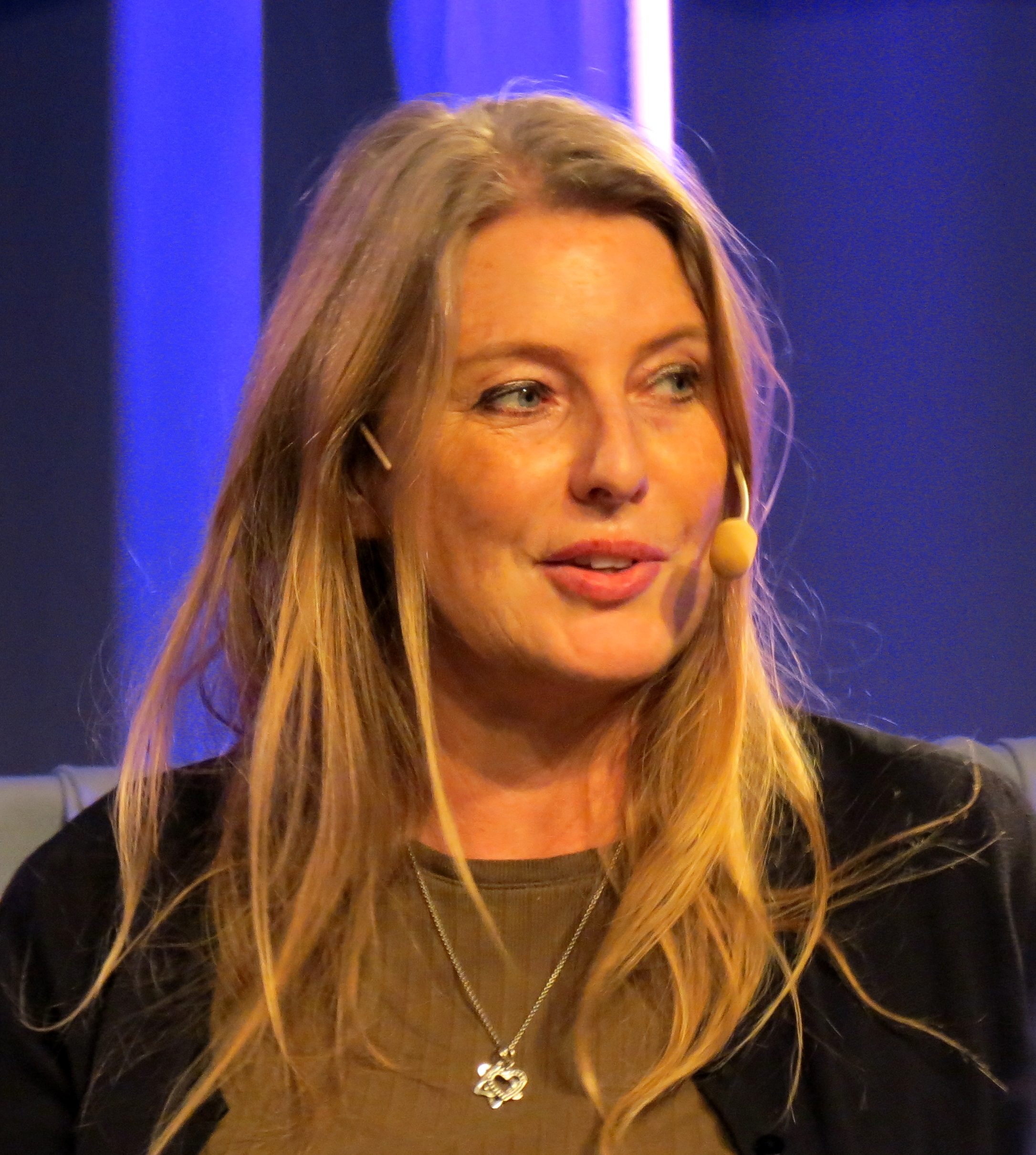 Cecilia Gyllenhammar intervjuas vid Bokmässan i Göteborg 2017.